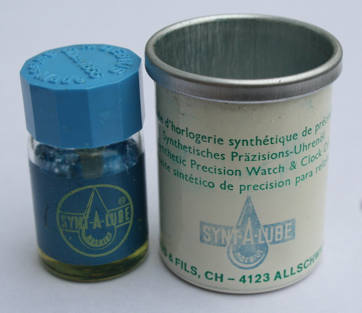 Uhrmacheröl